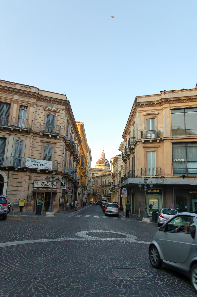 Chieti City 2011